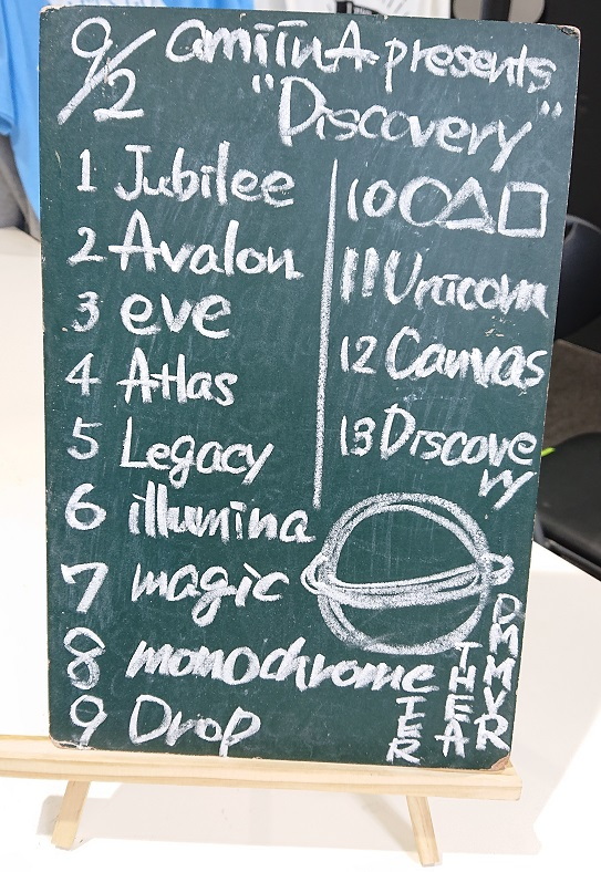 amiinAセトリボード(20180902(1))